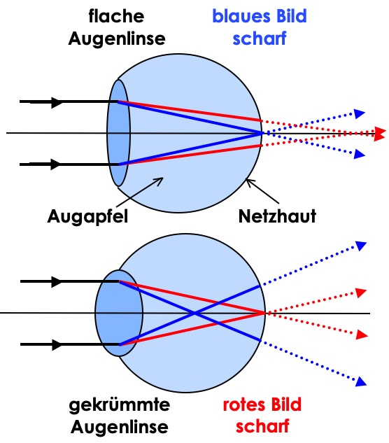 Farbperspektive: Kurzwelliges, blaues Licht wird stärker gebrochen als langwelliges, rotes (Dispersion). Deshalb treffen sich die blauen Strahlen näher an der Linse als die roten. Um einen roten Gegenstand scharf zu sehen, muss sich die Augenlinse stärker krümmen als für einen gleich weit entfernten blauen. Die Anstrengung unserer Augenmuskeln ist nun teilweise ein Maß dafür, wie nahe ein Gegenstand ist. Je größer die Anstrengung (und die Augenlinsen-Krümmung), um so näher erscheint uns der Gegenstand.